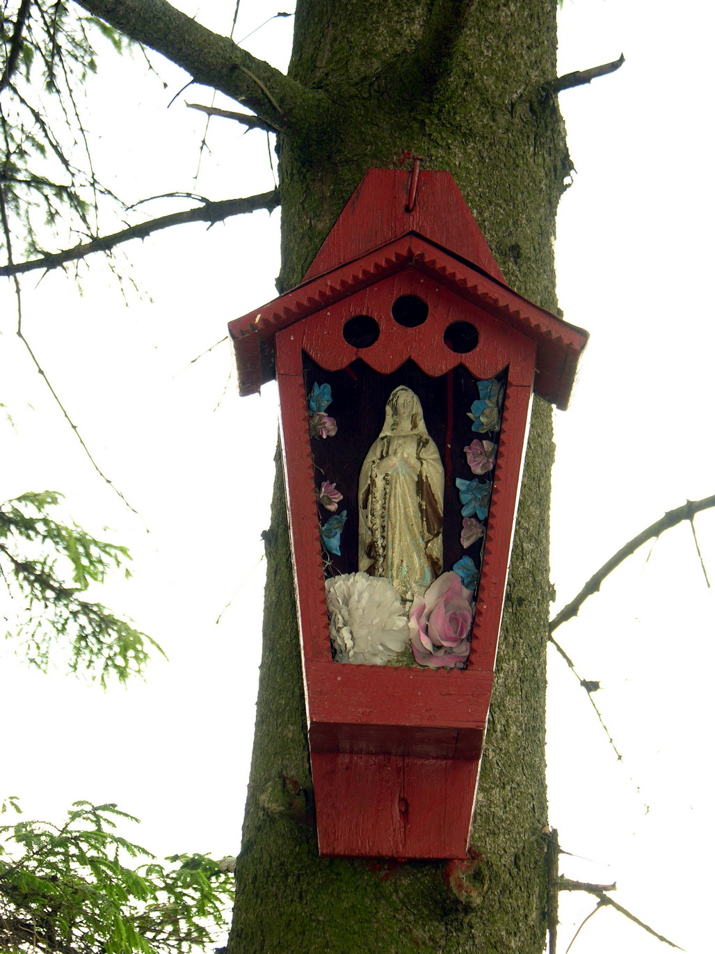 Žemaitėška: Kuoplyčelė medie Žemaitėjė Puortegrapėjė: Algėrda, nutraukta 2006-08-16.